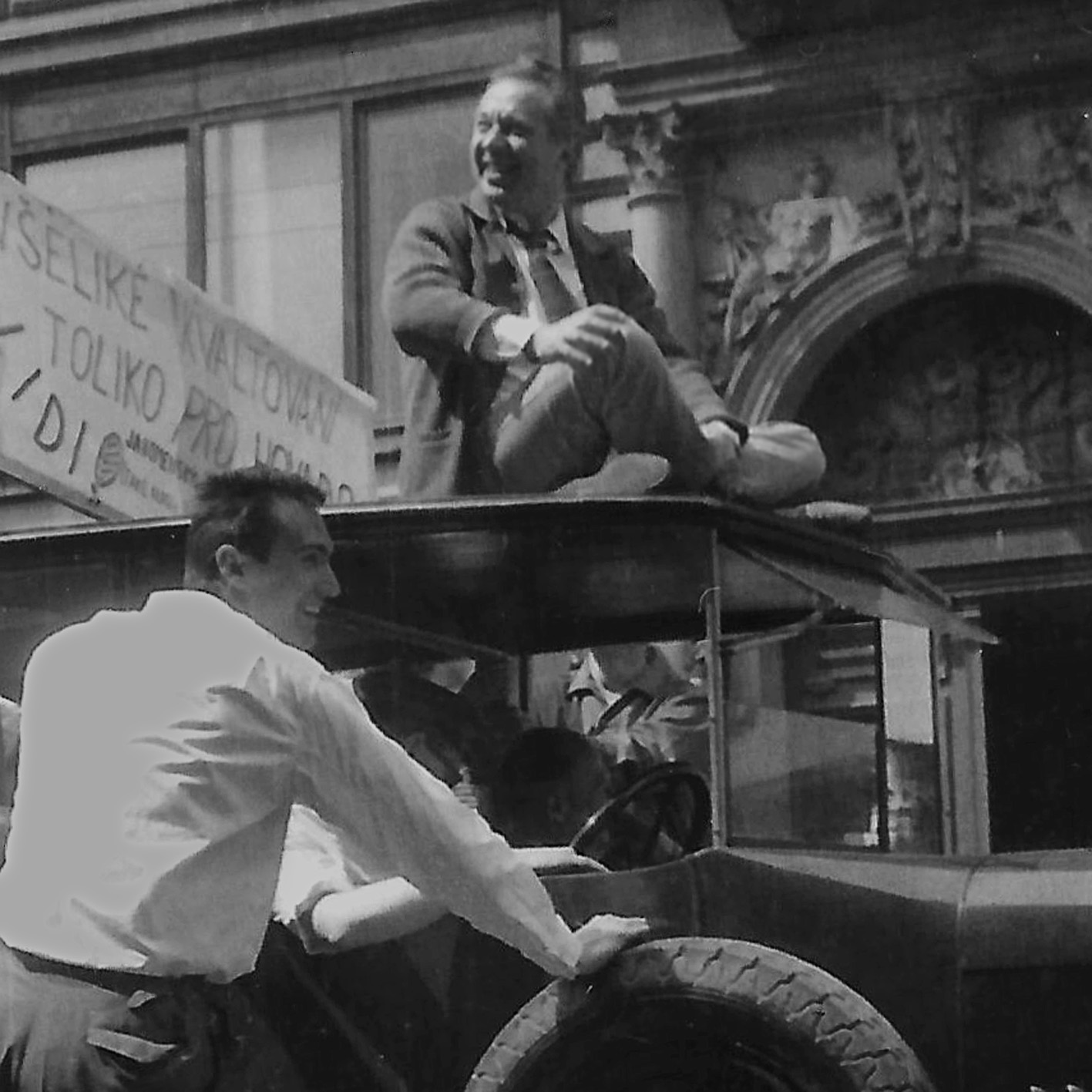 Majáles 1966-průvod studentů Prahou. Král majálesu Miroslav Horníček v obložení studentů.